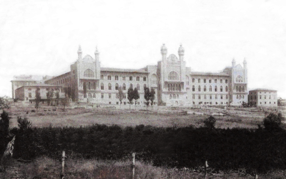 Fotografie der Militärmedizinischen Akademie Gülhane (II) in Konstantinopel